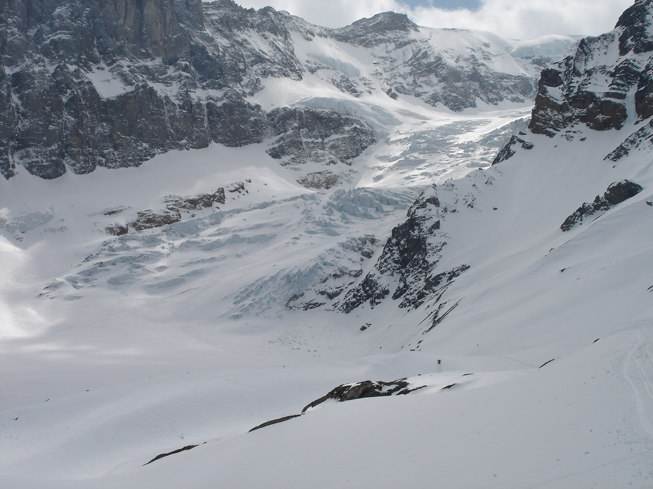 Die zwei Gletscherbrüche des Bifertenfirns, aufgenommen von den Fridolinshütten